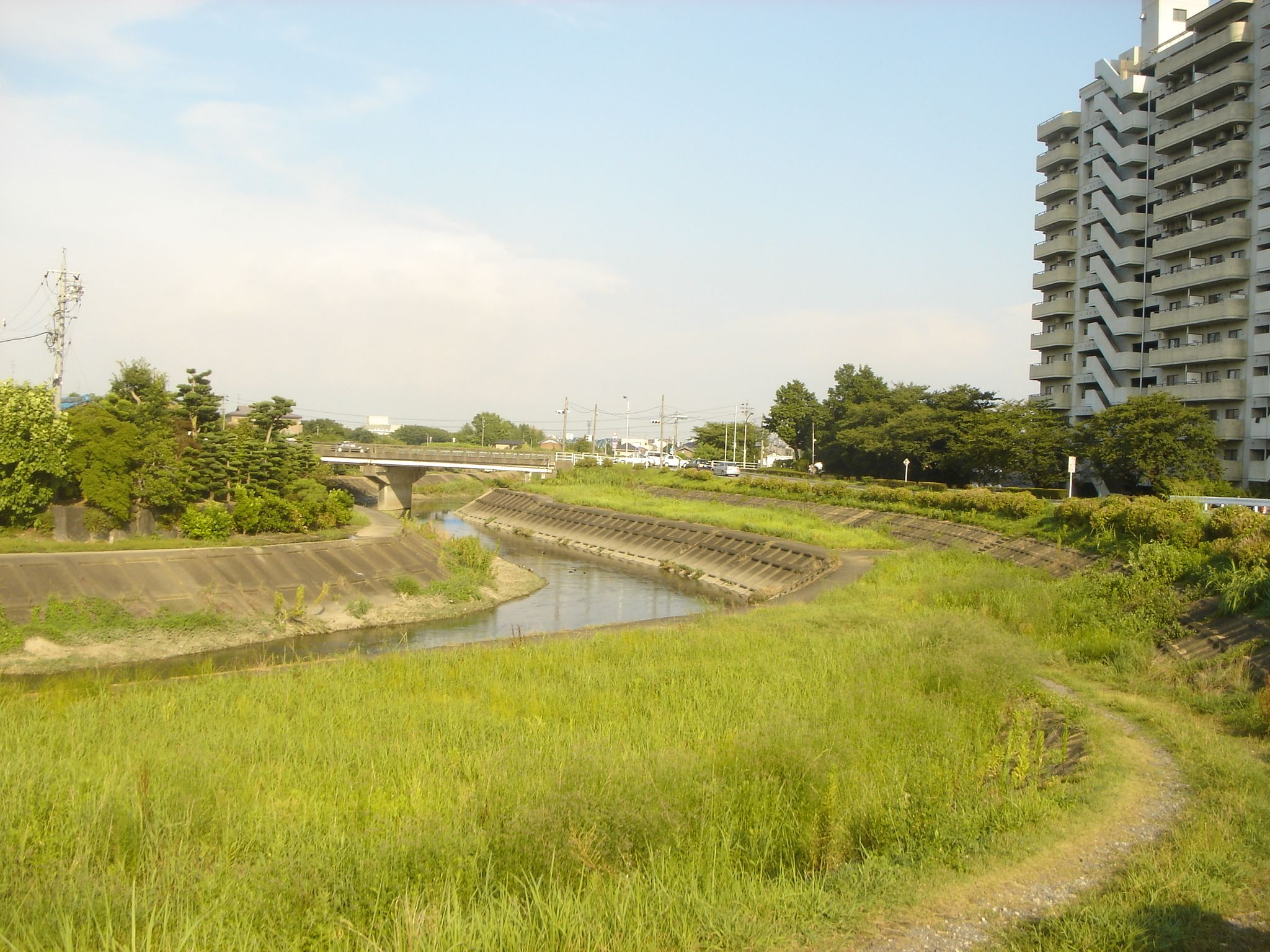 糸貫川、岐阜県瑞穂市で上流より撮影。奥の橋は苗代田橋（岐阜県道23号：本巣縦貫道）